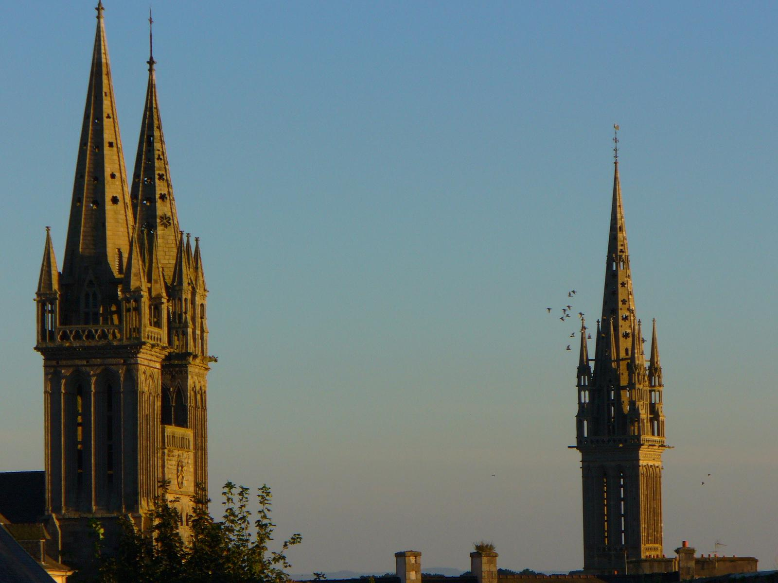 Saint-Pol de Léon - Les 3 tours